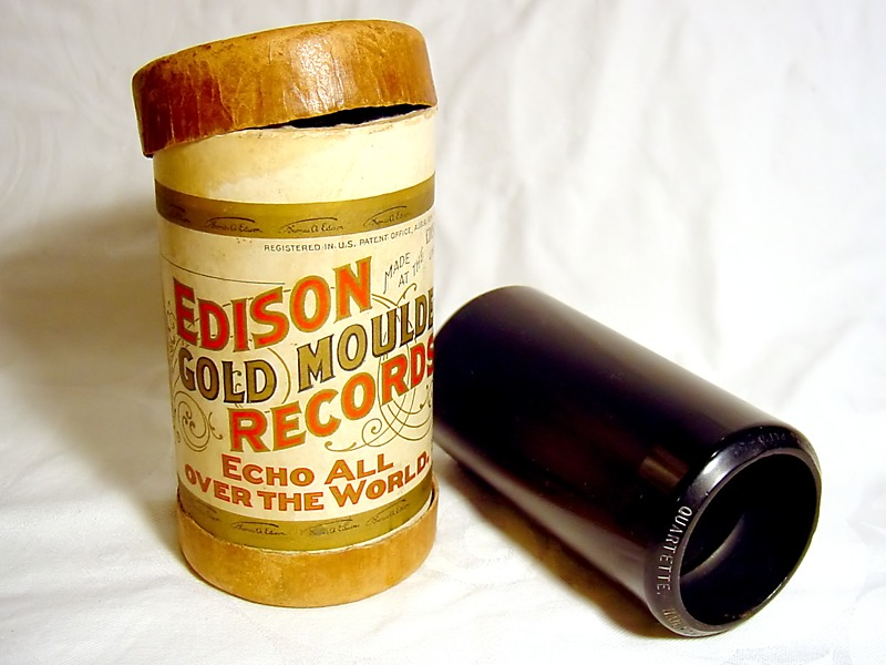 Edison Goldguß-Walze, ca. 1904 Foto: Norman Bruderhofer Kontakt